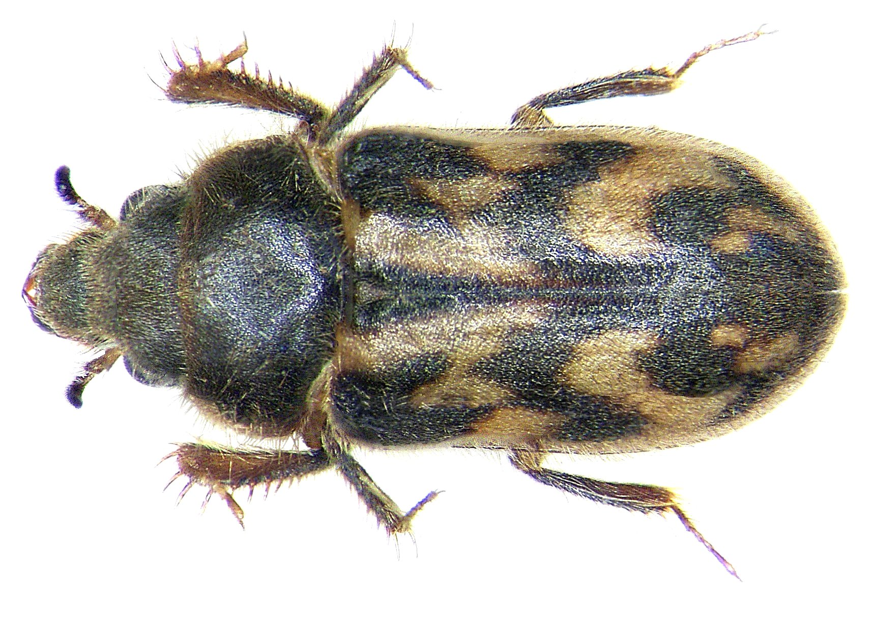 Familie: Heteroceridae Grösse: 4,5 mm Verbreitung: Europa Fundort: Germania, Oberfranken, Rudolphstein leg.det.U.Schmidt, 2000 Foto: U.Schmidt, 2006